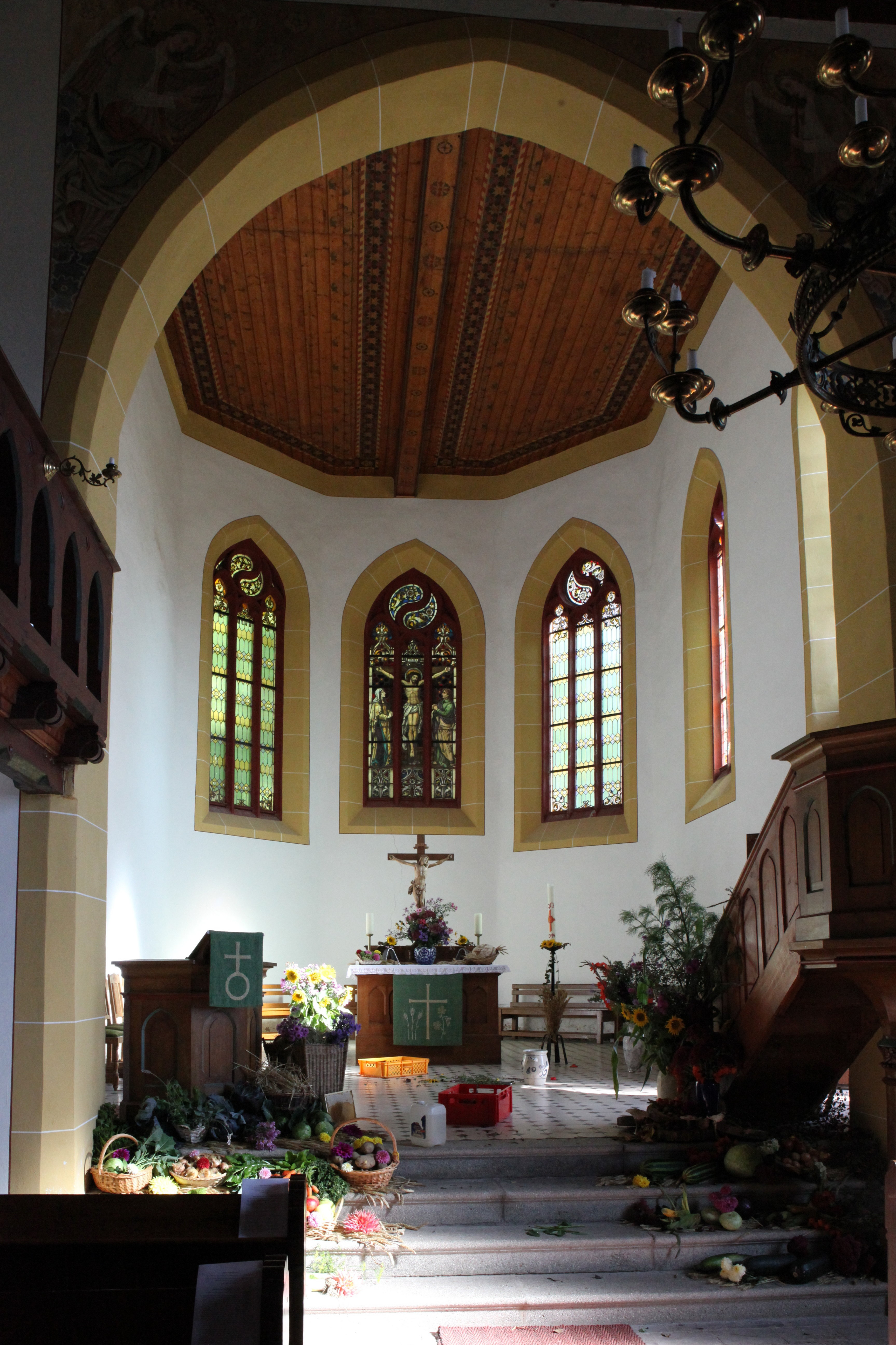 St. Marien in Stelzen, OT von Sachsenbrunn